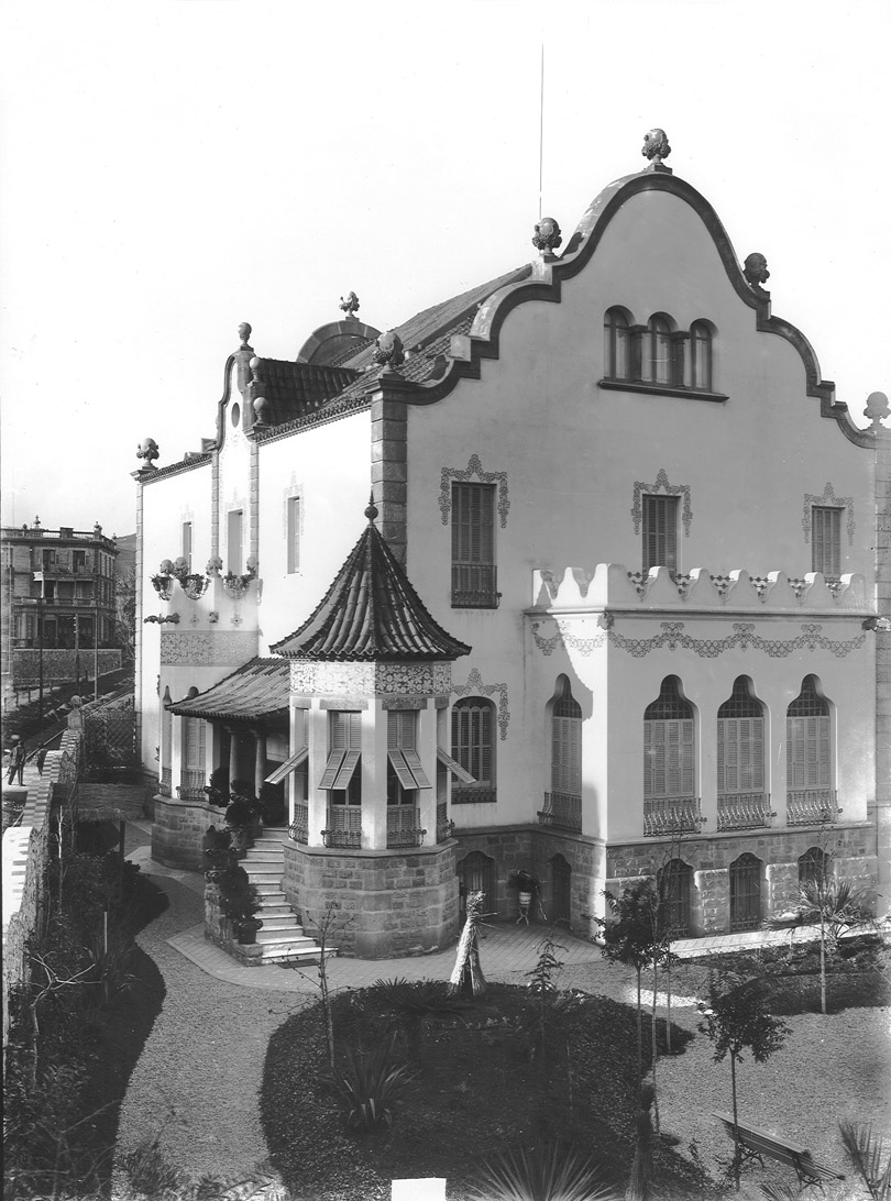 Exteriores originales de la casa Trinxet (1904)